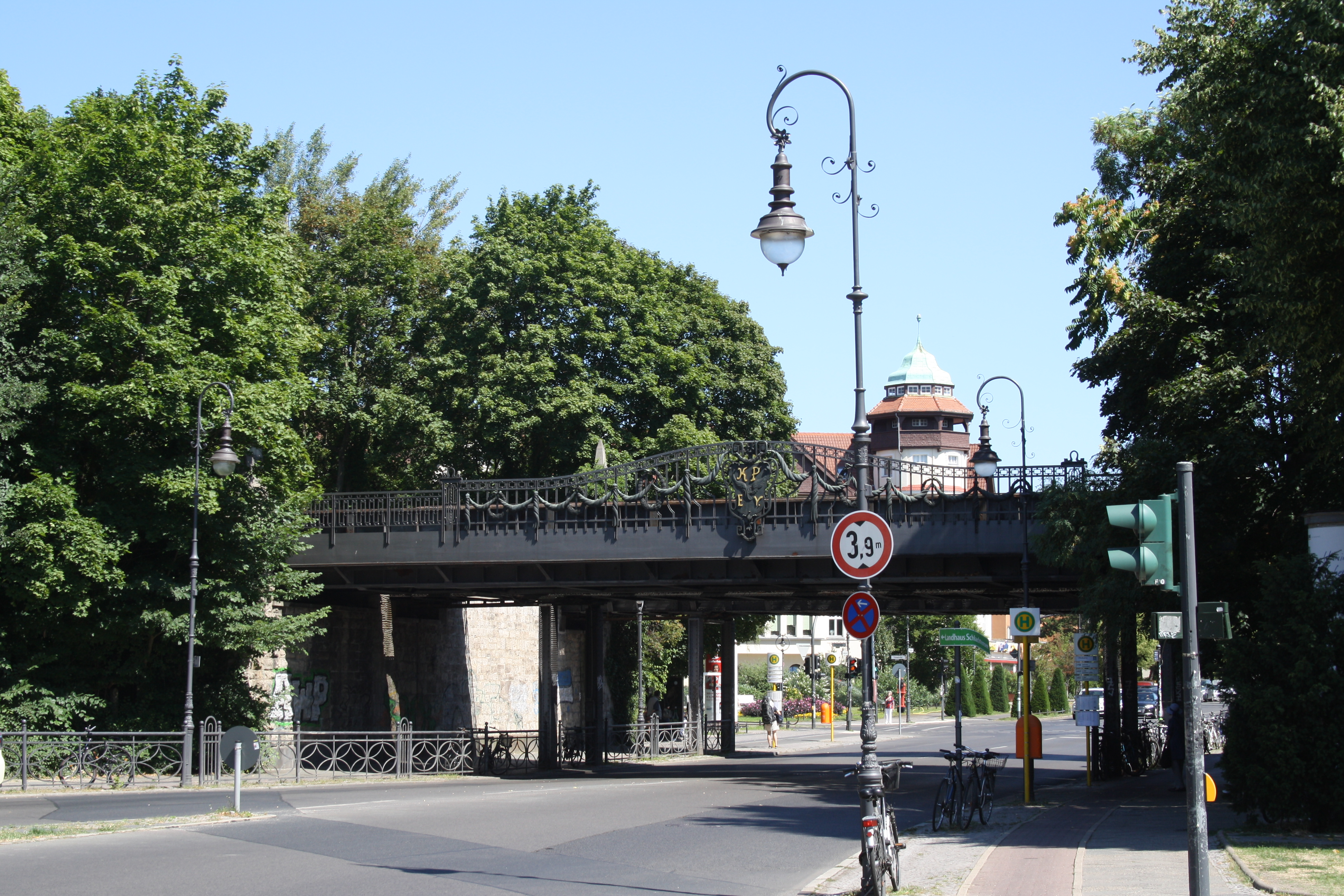 Bahnbrücke über die Lindenthaler Allee in Berlin-Zehlendorf